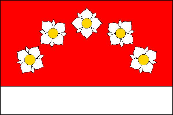 Vlajka obce Nová Pláň